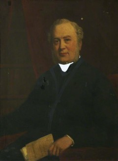 Porträt des Chorleiters Thomas Helmore (gest. 1890).